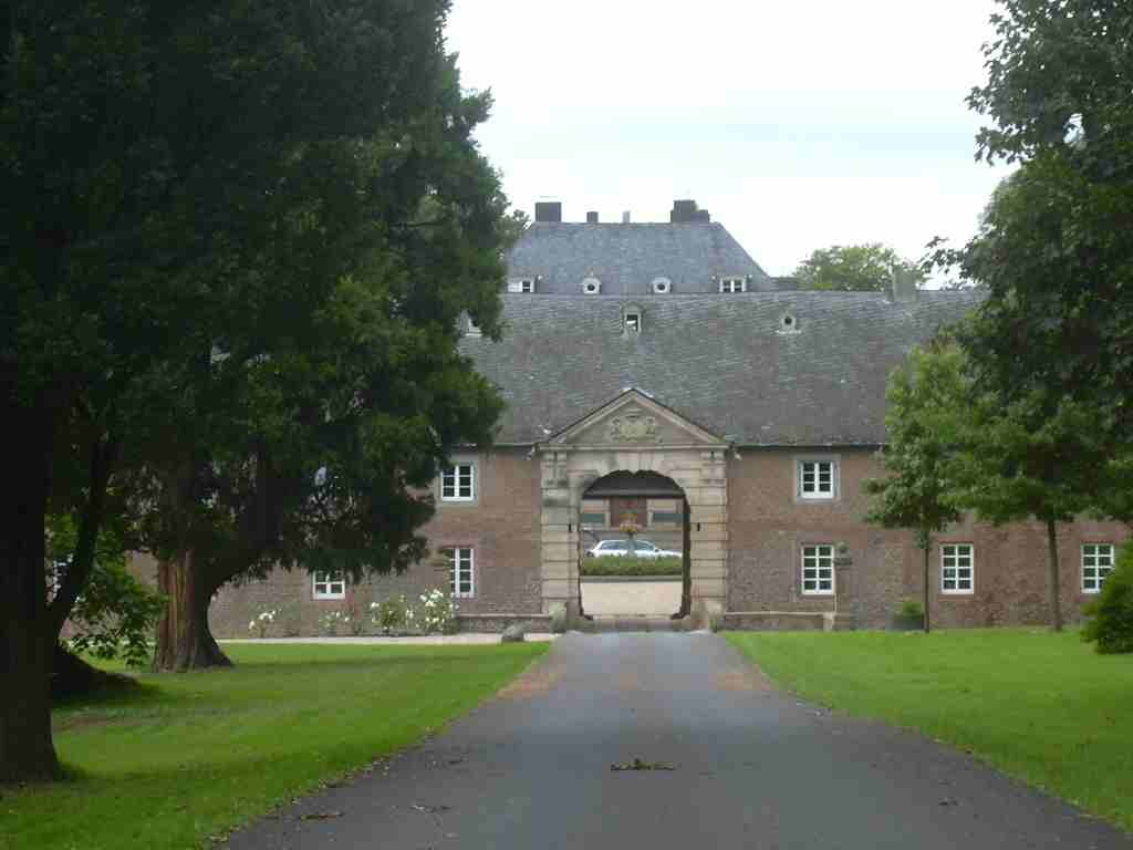 Burg Müddersheim, Einfahrt